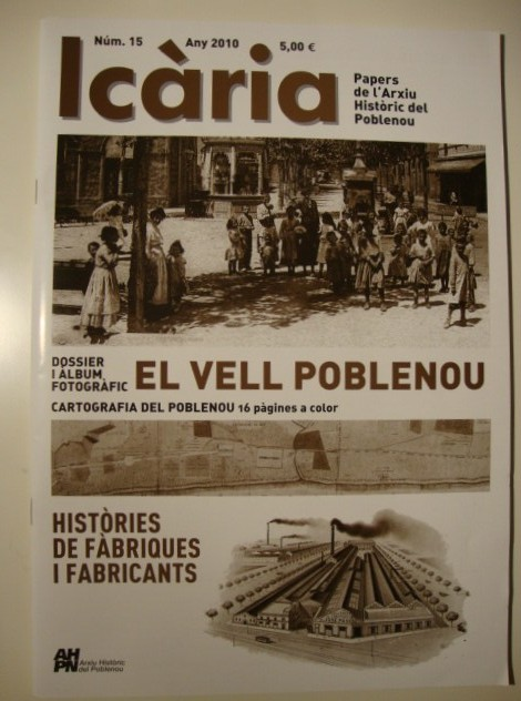 Número 15 de la Revista Icària.